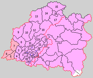 愛知県西加茂郡の町村制時点の町村。